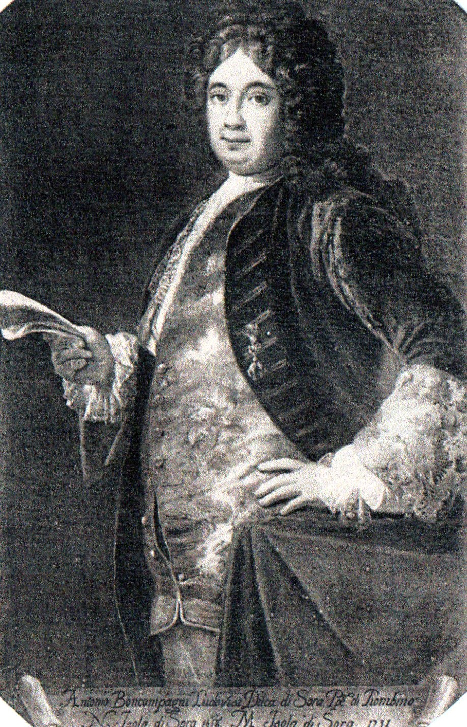 ritratto di Antonio I Boncompagni, principe di Piombino (+1731)